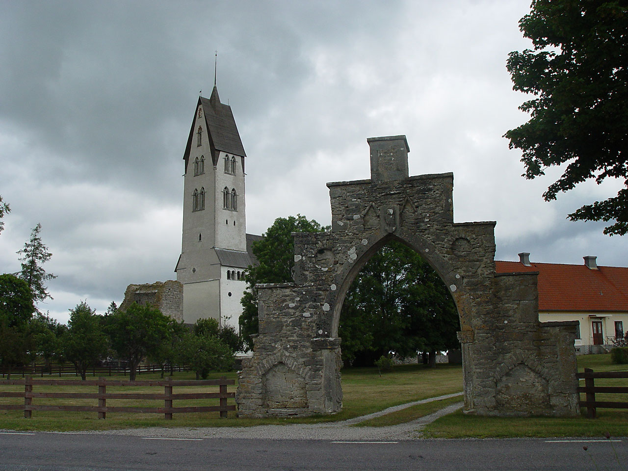 Gothems kyrka (Gotland)aus dem 13.Jh. Turmhöhe 52m.